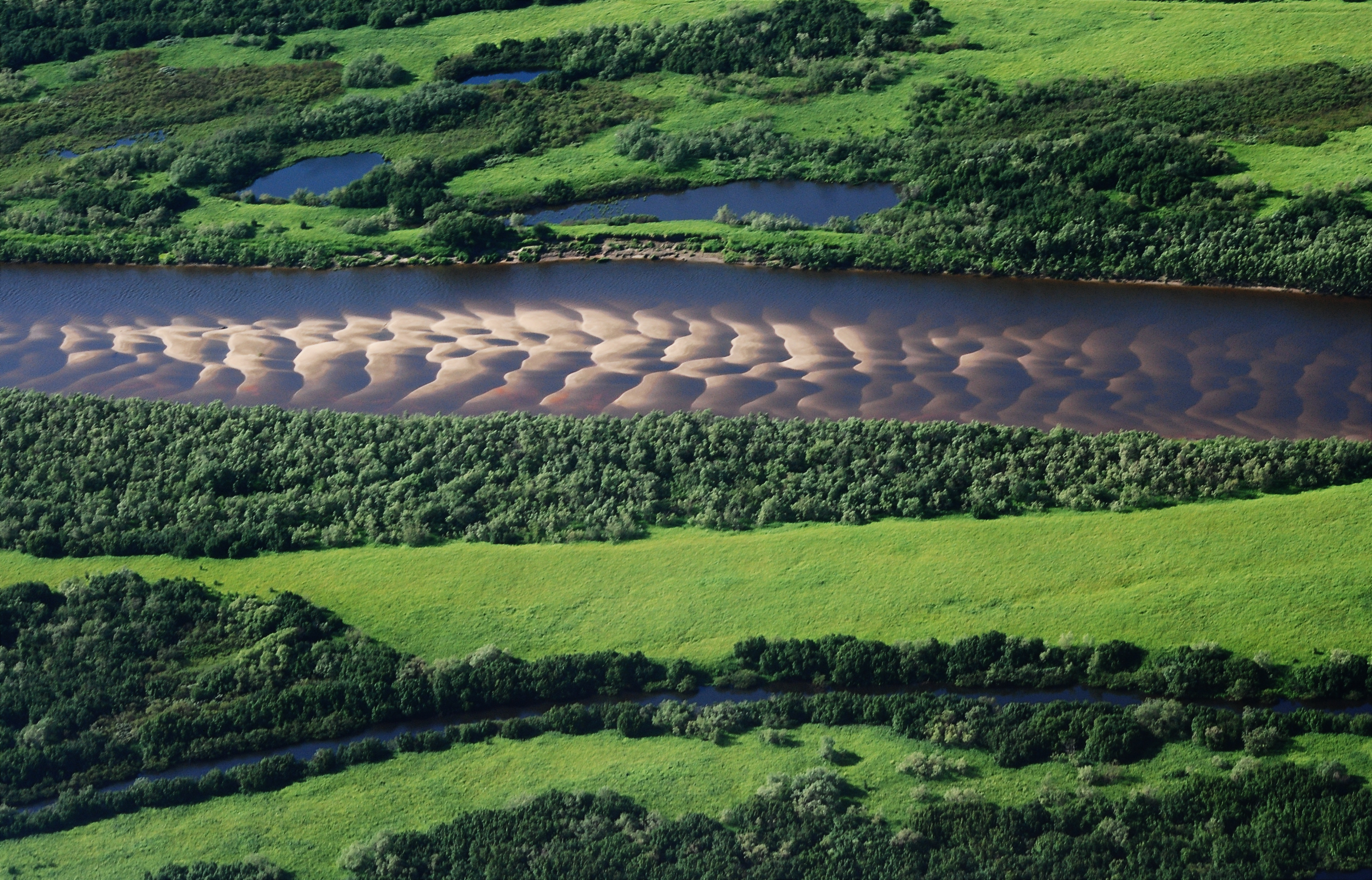 Печора